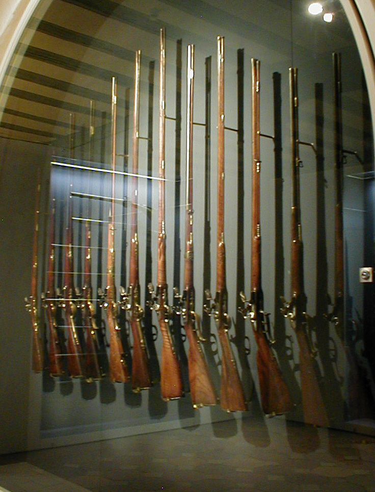 Vitrine aus der Waffensammlung im Museum Jagdschloss Kranichstein